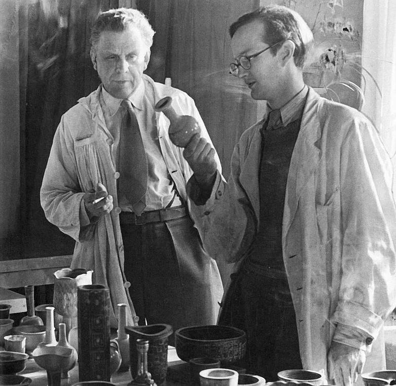 Stig Lindberg (t.h.) och Wilhelm Kåge i keramikverkstaden i slutet på 1930-talet på Gustavsberg.